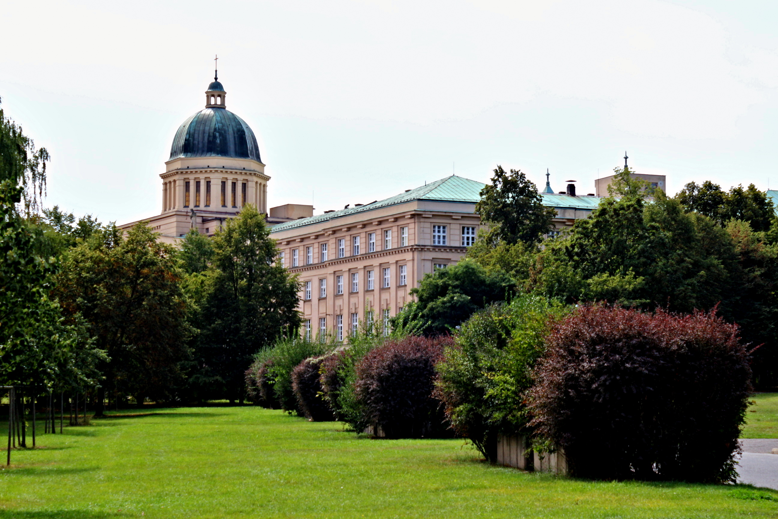 Arcibiskupský seminář v Praze-Dejvicích